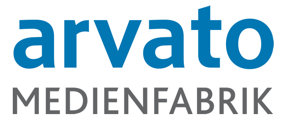 Unternehmenslogo der Medienfabrik